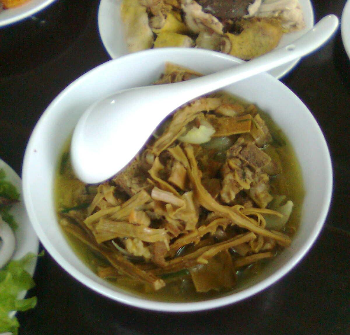 Ảnh chụp 01 tô canh măng (có thể dùng minh họa cho bài viết trong chủ đề ẩm thực Việt Nam)